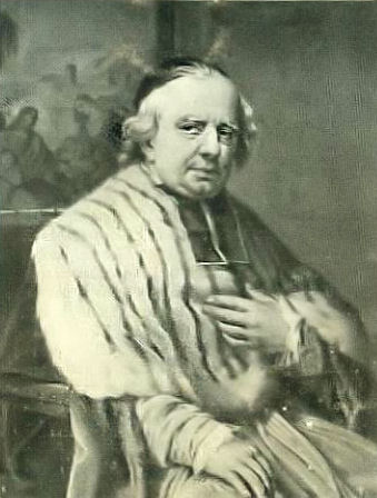 Portret van Kanunnik Triest, winterkoorkledij